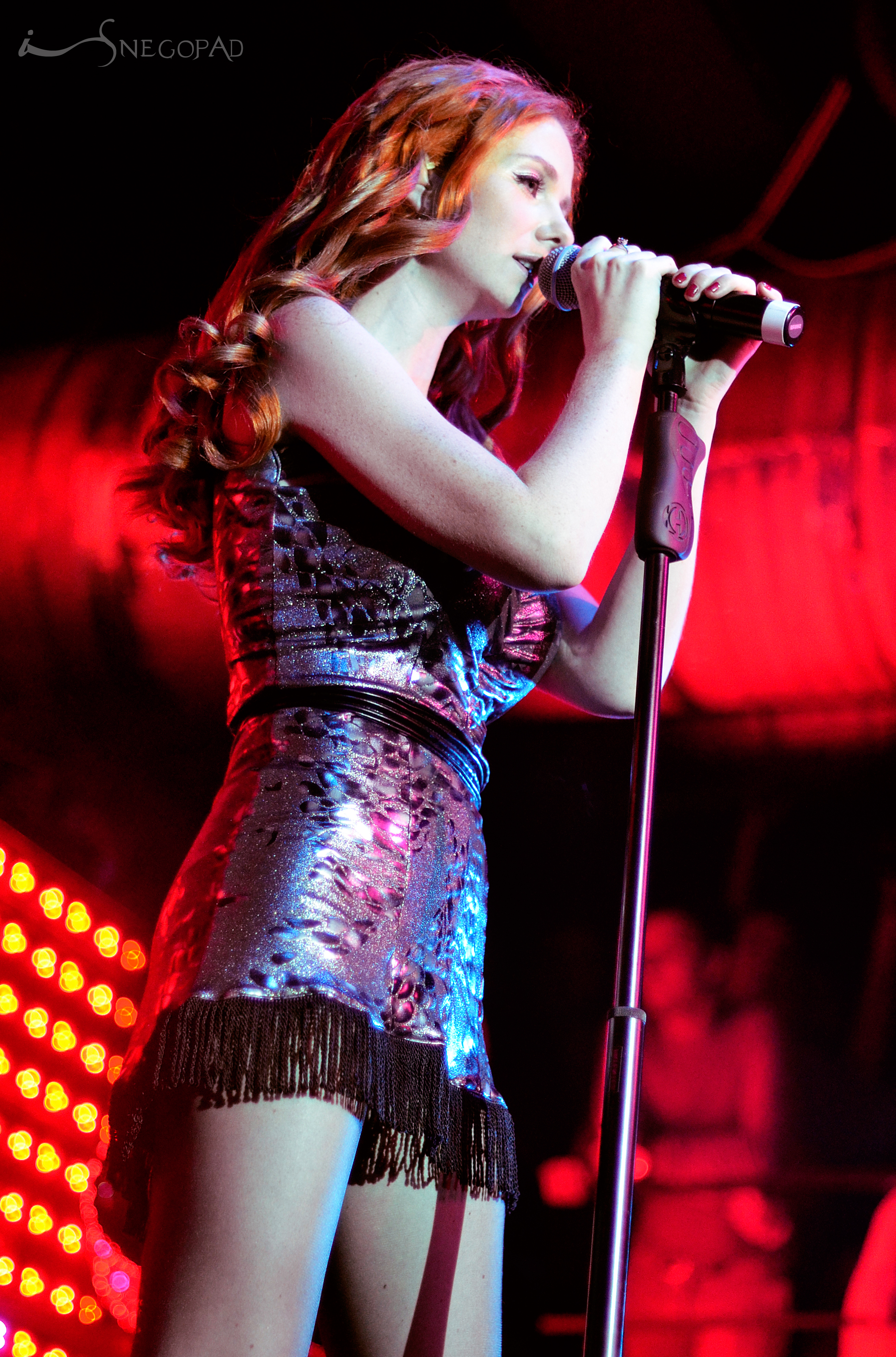 Лена Катина, сольный концерт в Москве.